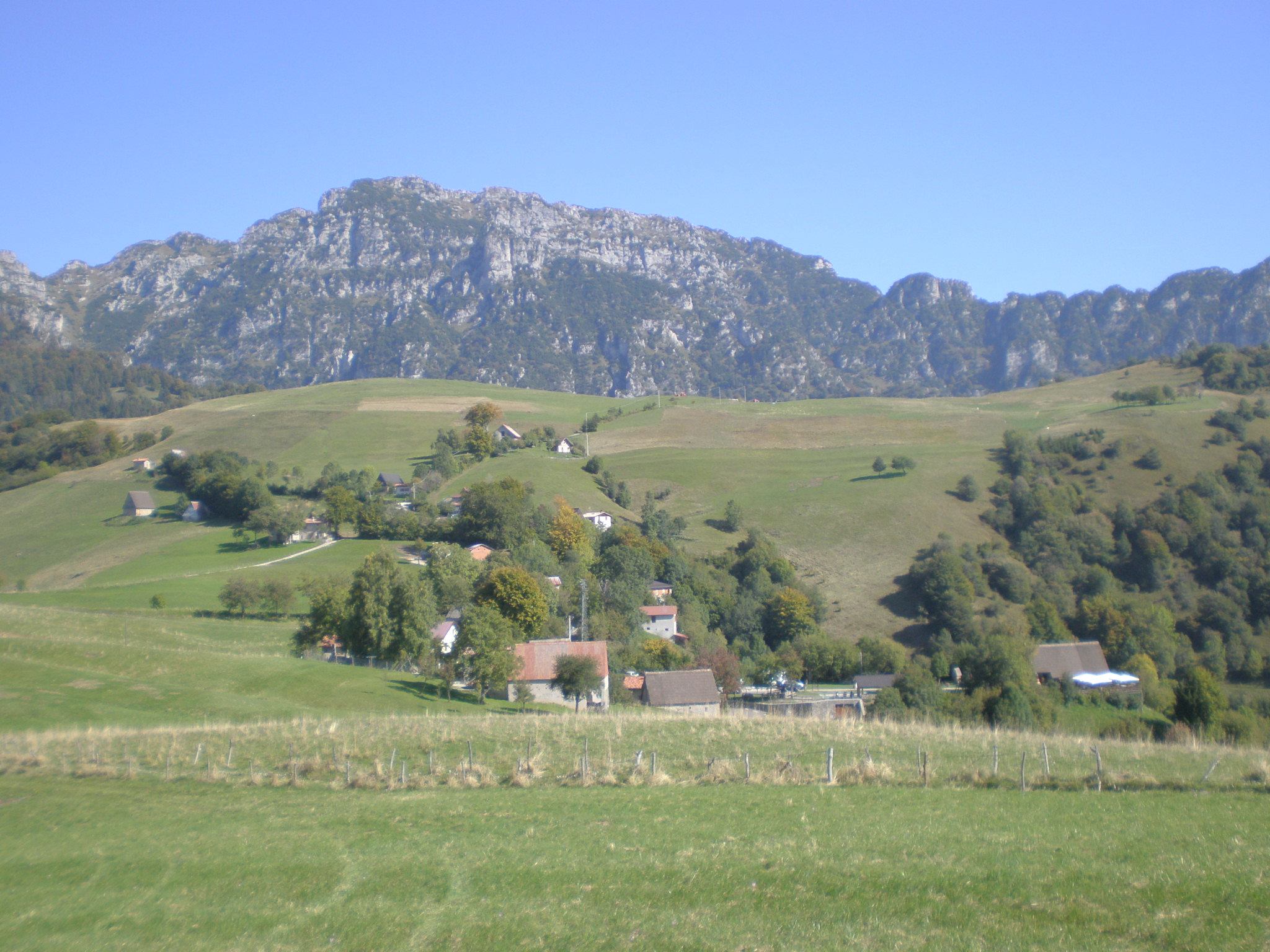 Monte Caplone visto da Magasa